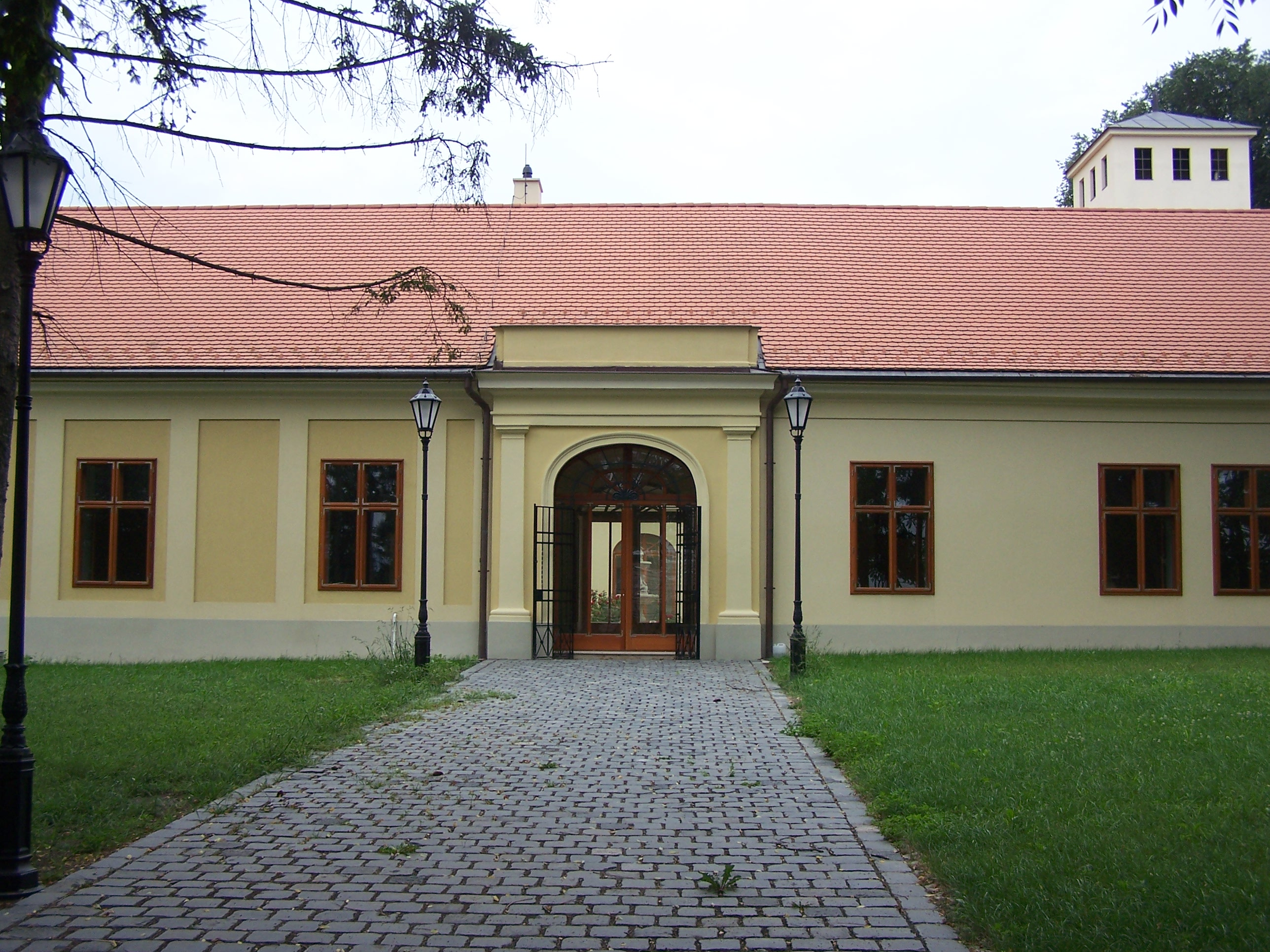 Latinovits-Bottlik-kúria (Vácduka, Rákóczi u. 28.) This is a photo of a monument in Hungary, Identifier: 7561